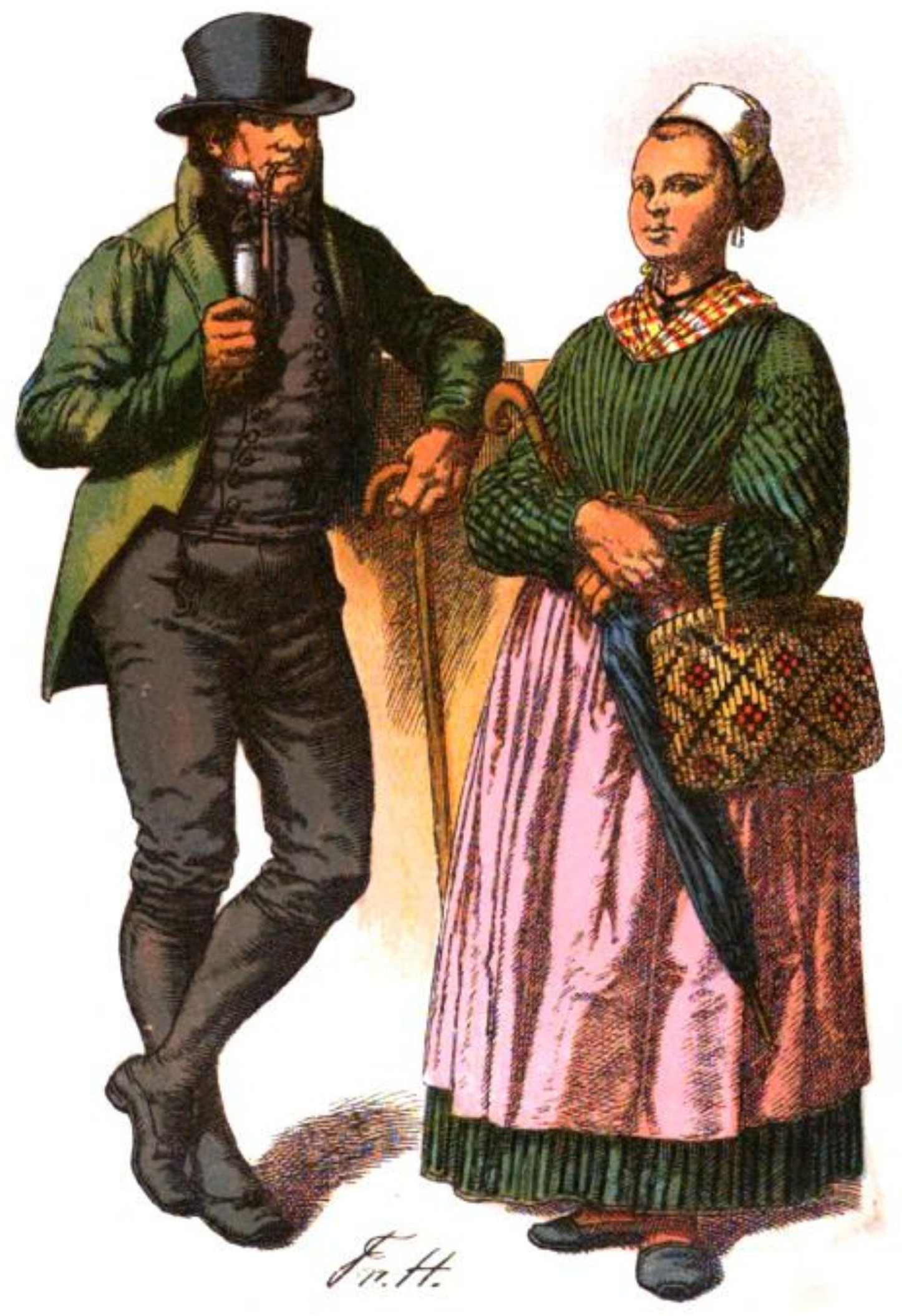 Friedrich Hottenroth: Nassauisches Trachtenbuch Tafel 27: Bürgersleute aus Johannisberg 1840